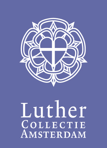 Logo van de Luther Collectie Amsterdam